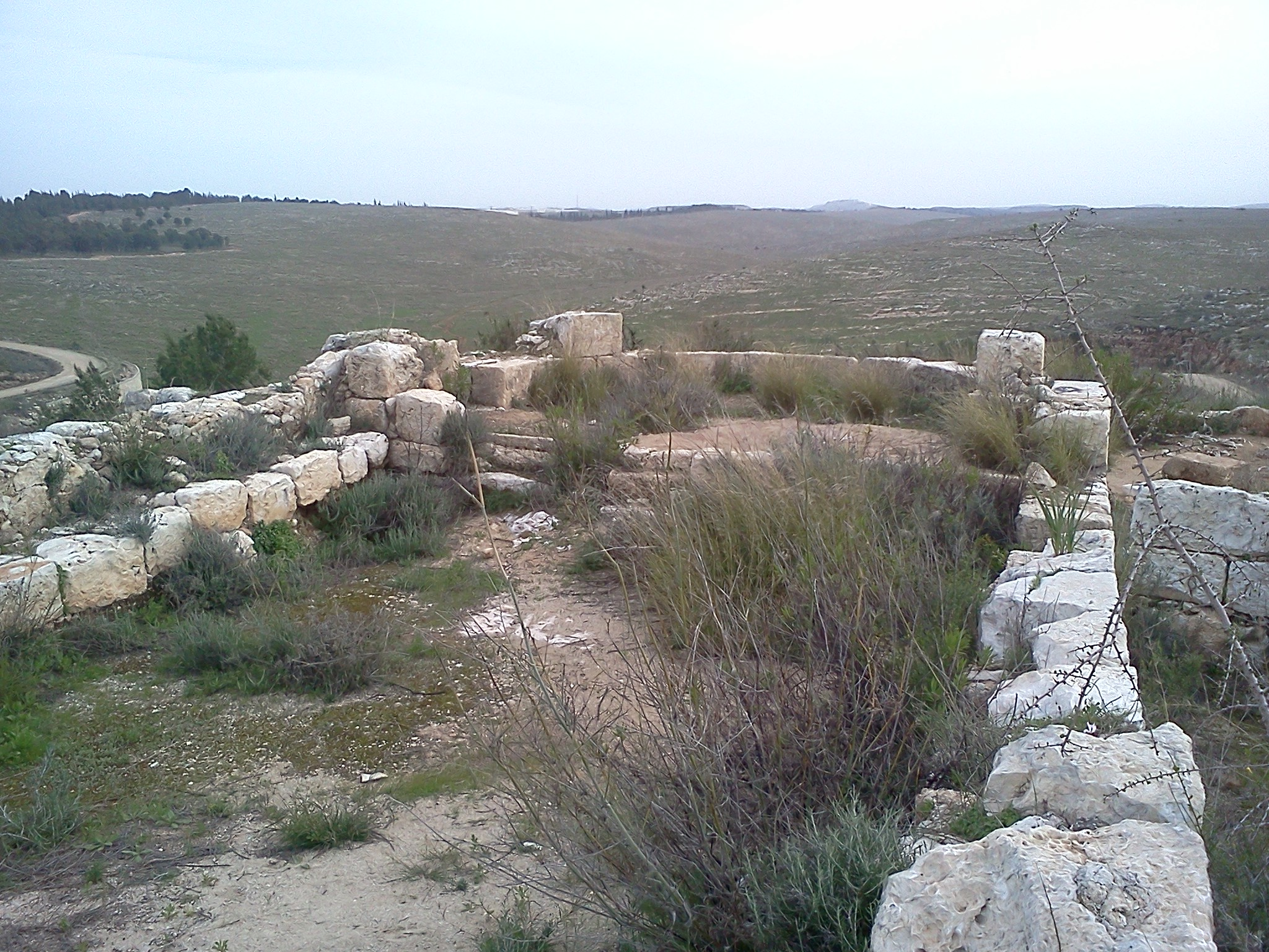 חרבת חני וחלקו העליון של נחל ברקת